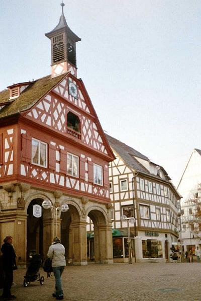 Waiblingen hist. Rathaus